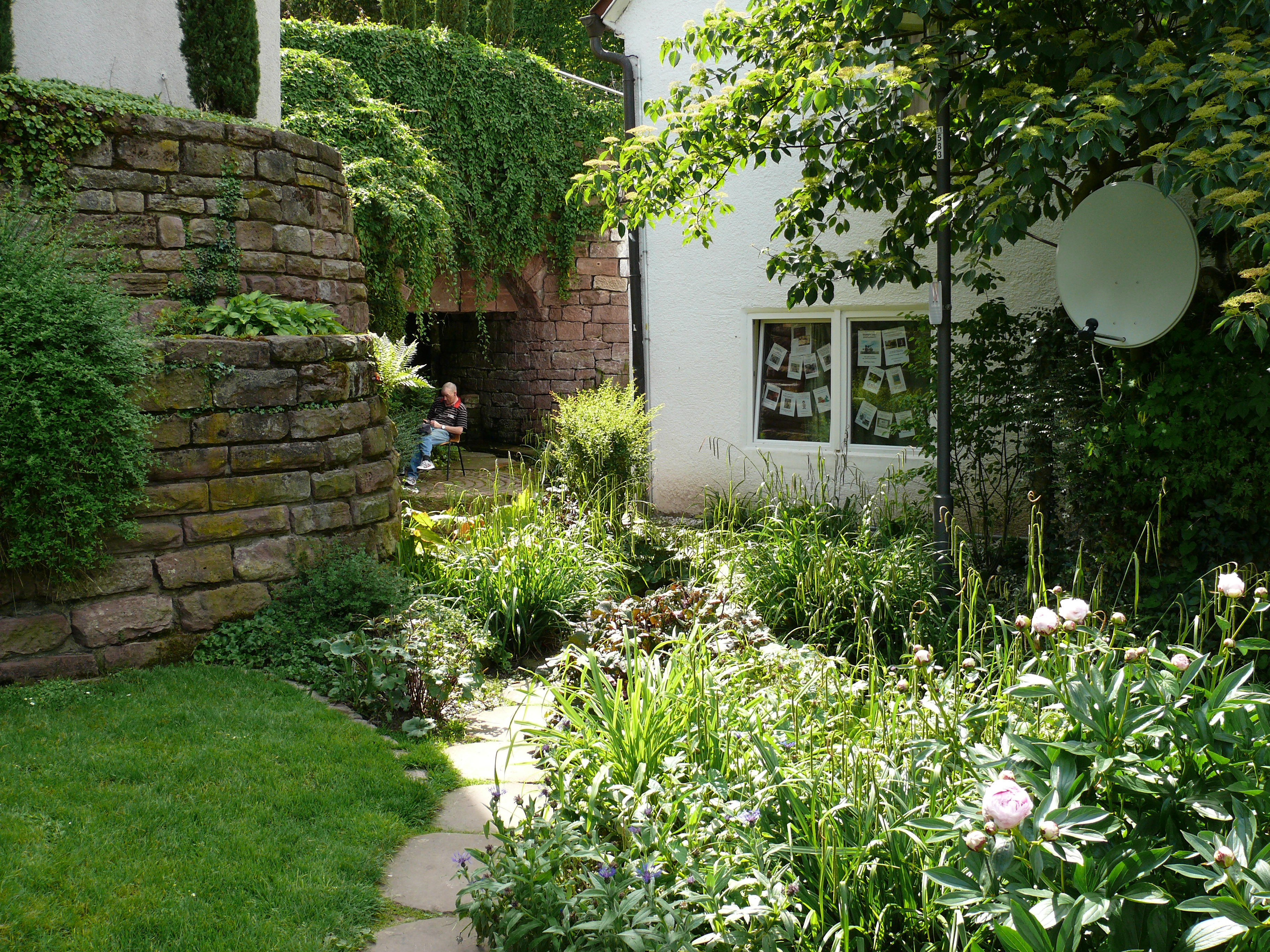 Der Hessegarten in Calw, zu Ehren von Hermann Hesse.